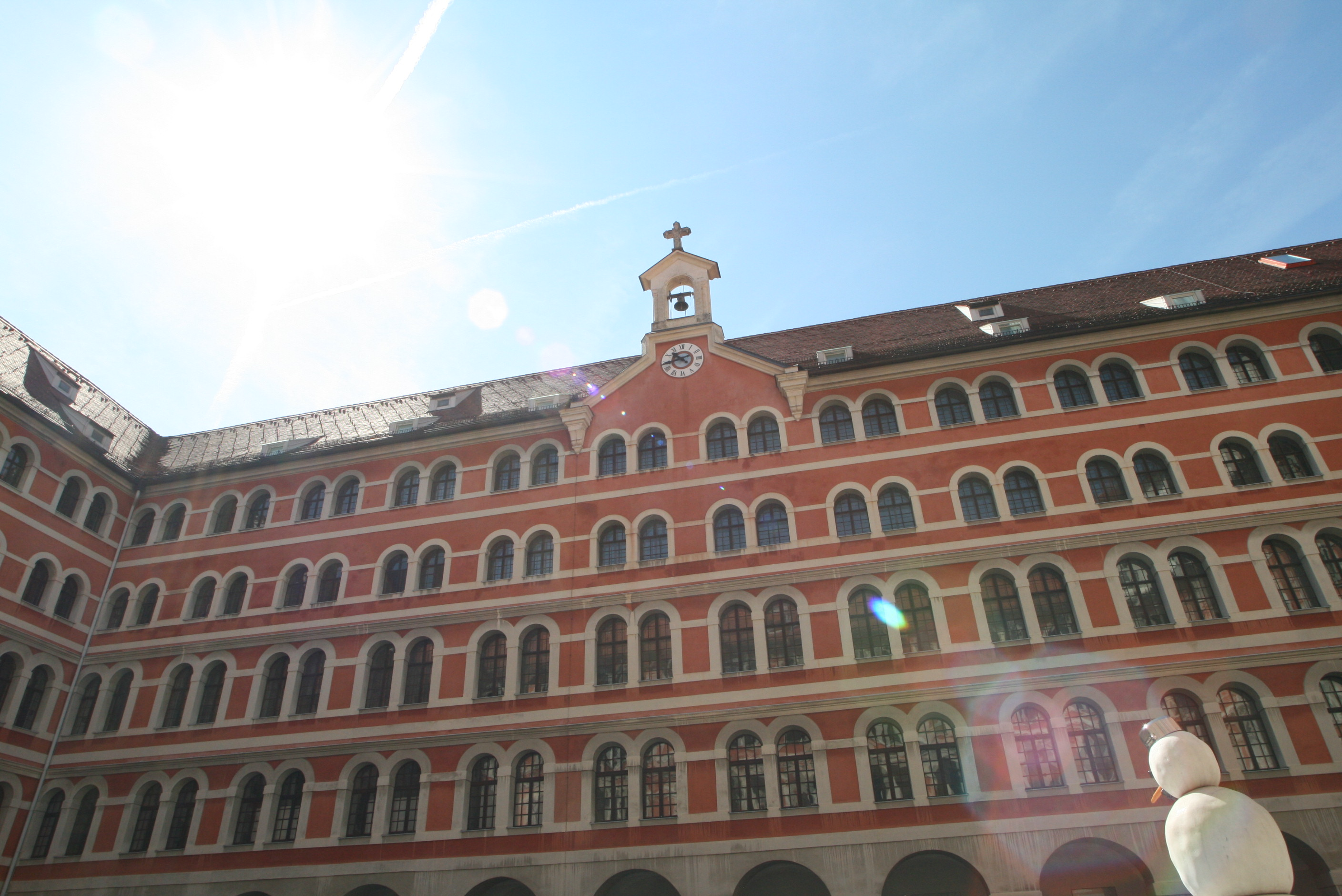 Hofanlage des Priesterseminars